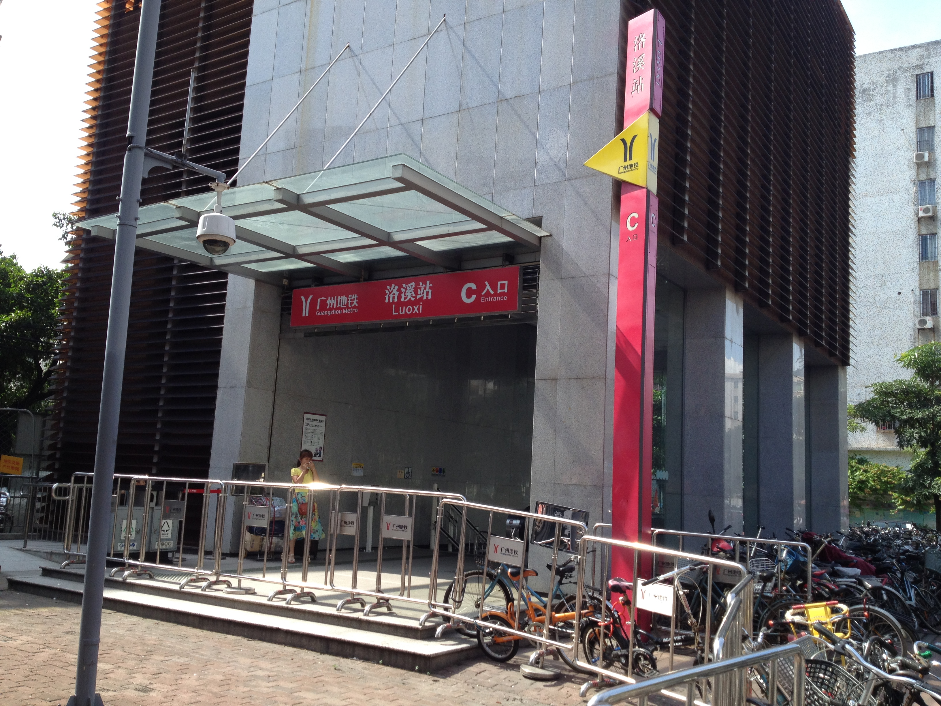 广州地铁洛溪站C出口